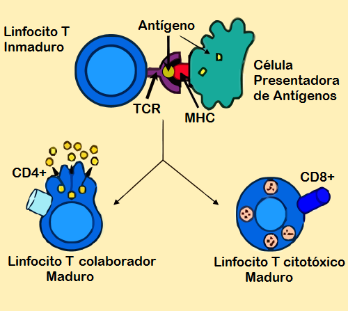 La presentación de antígenos estimula a los linfocitos (células) T a convertirse ya sean "citotóxicos" CD8+ o "colaboradores" CD4+. Los linfocitos citotóxicos atacan de forma directa a otras células que contengan ciertas moléculas exógenas anormales en sus superficies. Los linfocitos T colaboradores, o Th (por sus siglas en inglés), coordinan las respuestas inmunes mediante la comunicación con otras células. En la mayoría de casos, los linfocitos T sólo reconocen los antígenos contenidos en la superficie mediante una de las moléculas de MHC (complejo mayor de histocompatibilidad) del propio cuerpo.